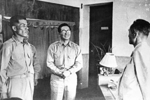 1951.06.22 대한민국 육군참모총장 이취임식(좌로부터 이종찬, 정일권, 이기붕 순)